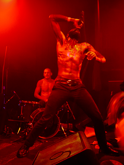 Festsaal Kreuzberg, Berlin